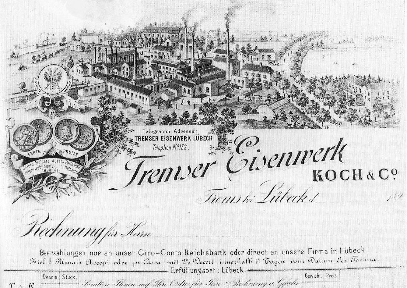 Briefkopf der Fa. Tremser Eisenwerk Koch & Co. aus den 90er Jahren des 19. Jahrhunderts. Carl Thiel verstarb 1892, Heinrich Christian Julius Koch verstarb 1875/76 und seine Witwe 1894.